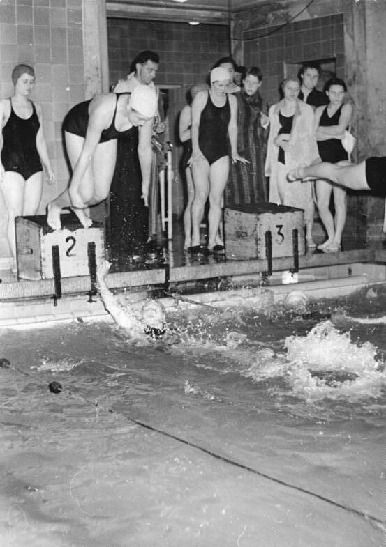 Leipzig, II. Deutsche Turn- und Sportfest, Rücken-Staffel Zentralbild Kollektiv Pu-Sch. 1858 AV 4.8.1956 3.8.1956 II. Deutsche Turn- und Sportfest in Leipzig Schwimmwettkämpfe im neuen Schwimmstadion in Leipzig Am Freitag, dem 3.8.1956, nahmen die Schwimmwettkämpfe während des II. Deutschen Turn- und Sportfestes mit dem Kunstspringen (Damen), Turmspringen (Herren), 100 m Rücken (Damen), 200 m Schmetterling (Herren) und 100 m Freistil (Damen) ihren Fortlauf. UBz: Über 200 m Schmetterling der Herren siegte Hans Zierold (SC Wissenschaft DhfK Leipzig).